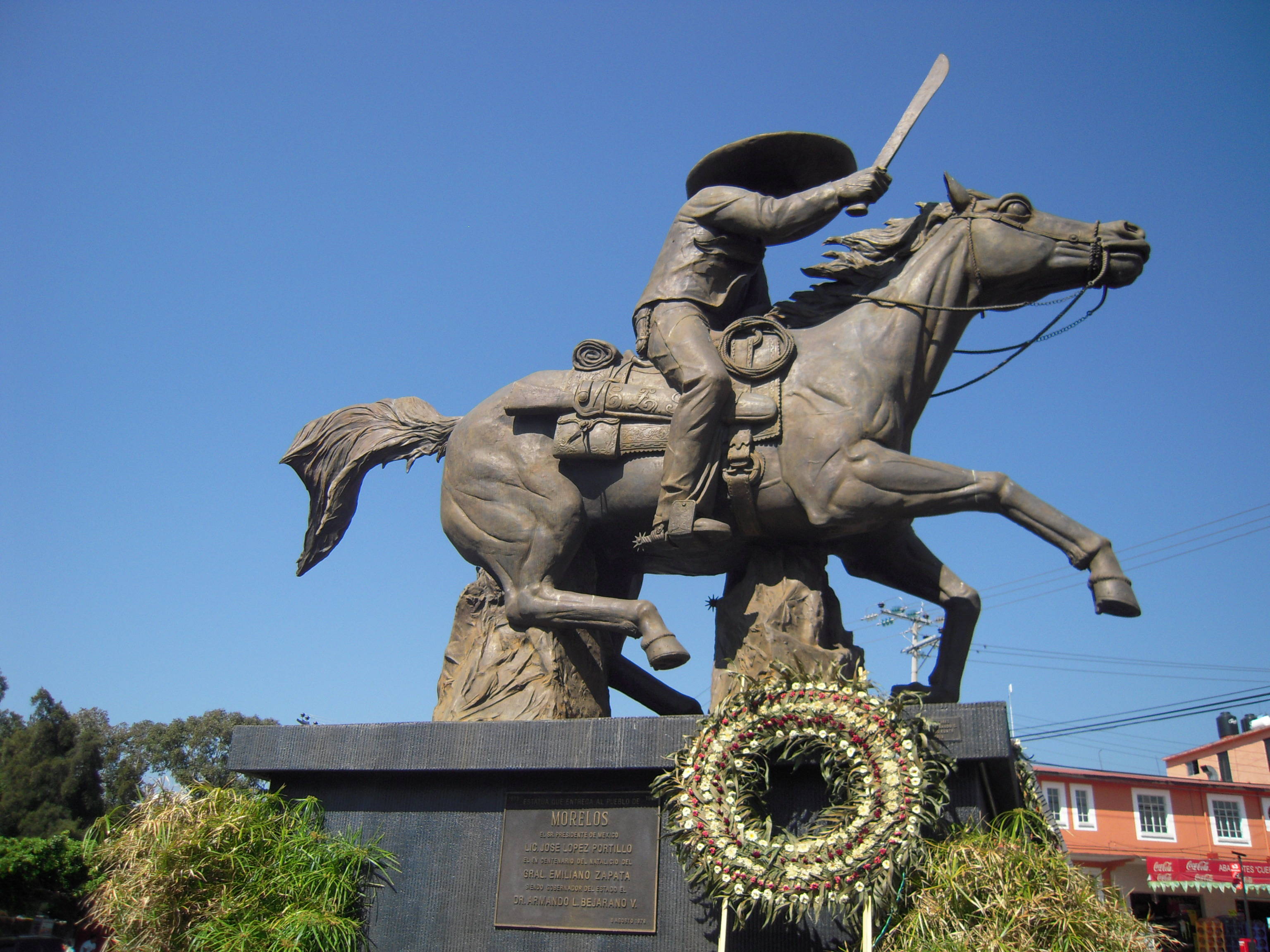 Cuernavaca